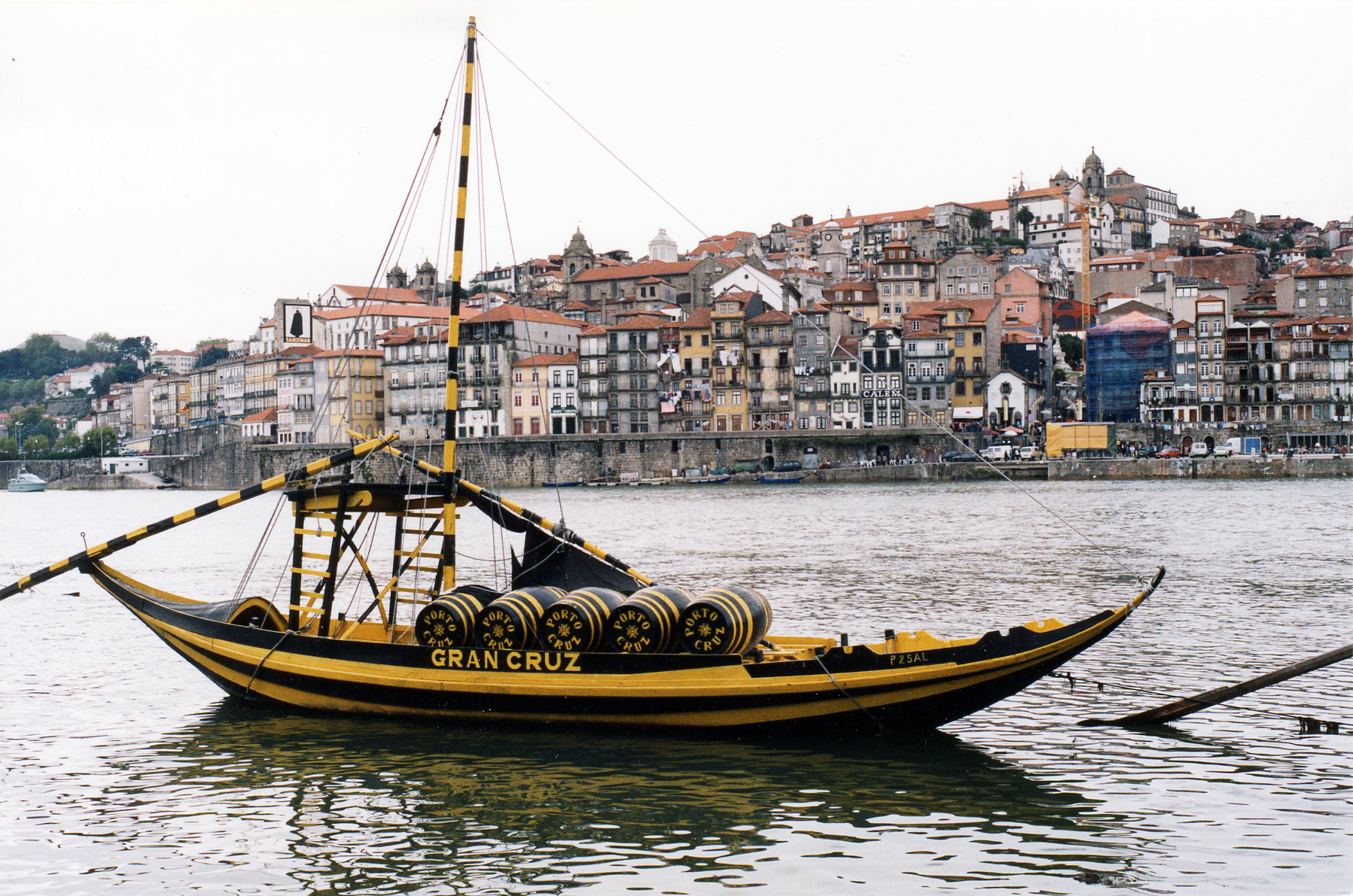 Blick über den Rio Douro auf Porto